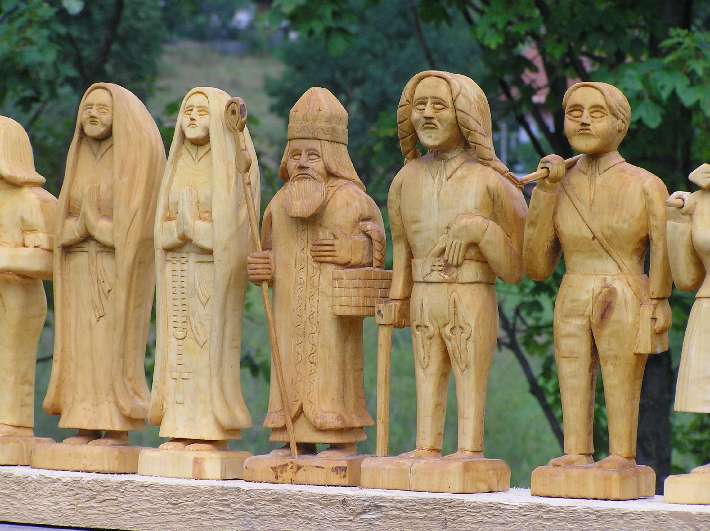 Vyrezávané bábky, diela ľudového rezbára Jozefa Smutniaka z Jóbovej ráztoky pri Veľkom Borovom